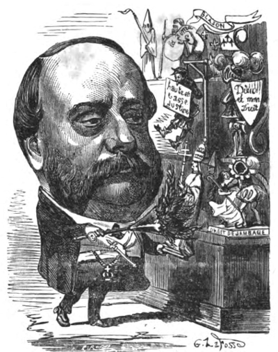 Portrait satirique de Henri d'Artois, comte de Chambord.